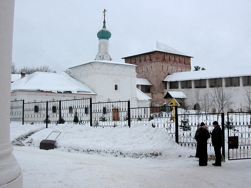 Pafnutievo-Borovsky Monastery, Russia